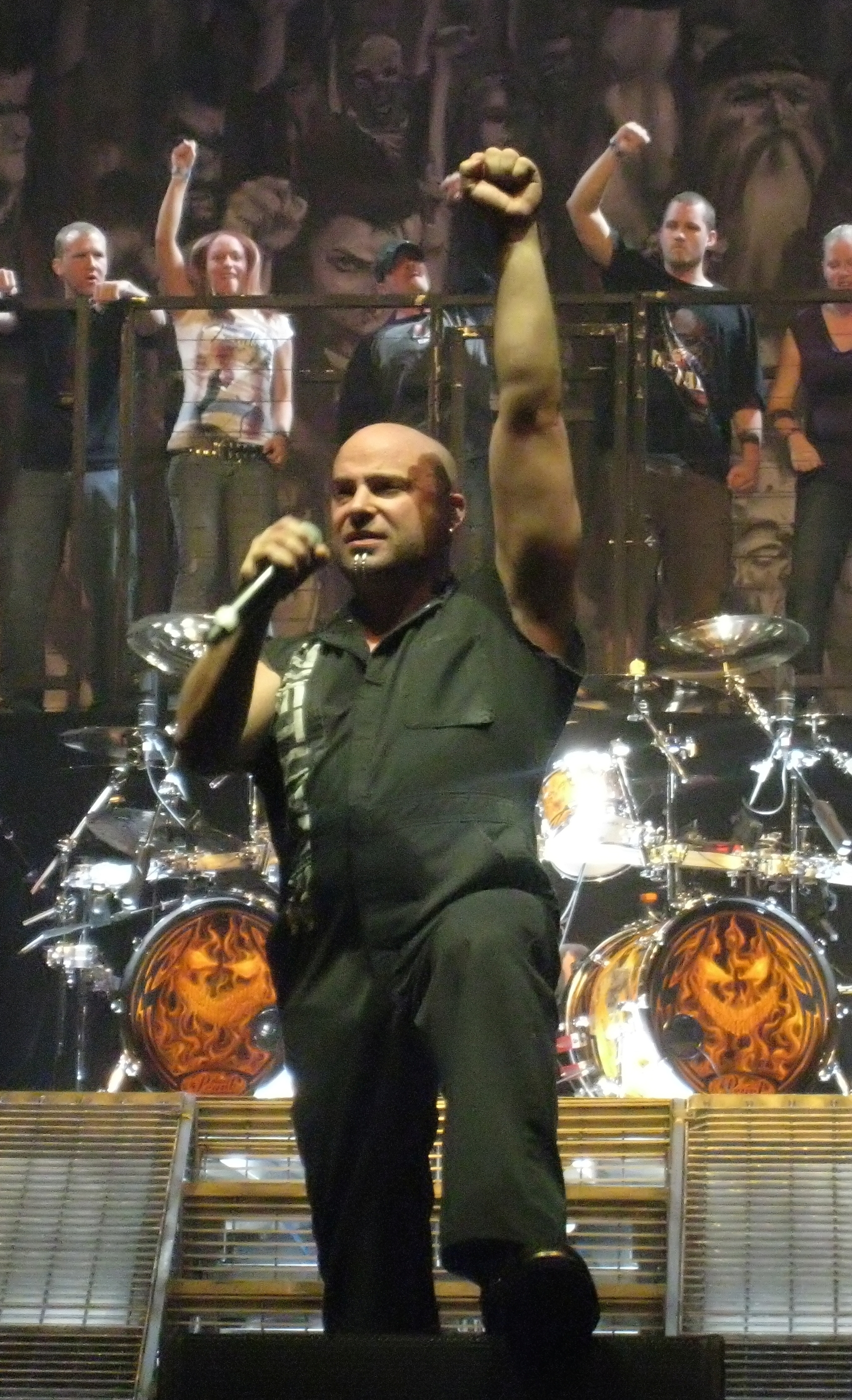 David Draiman